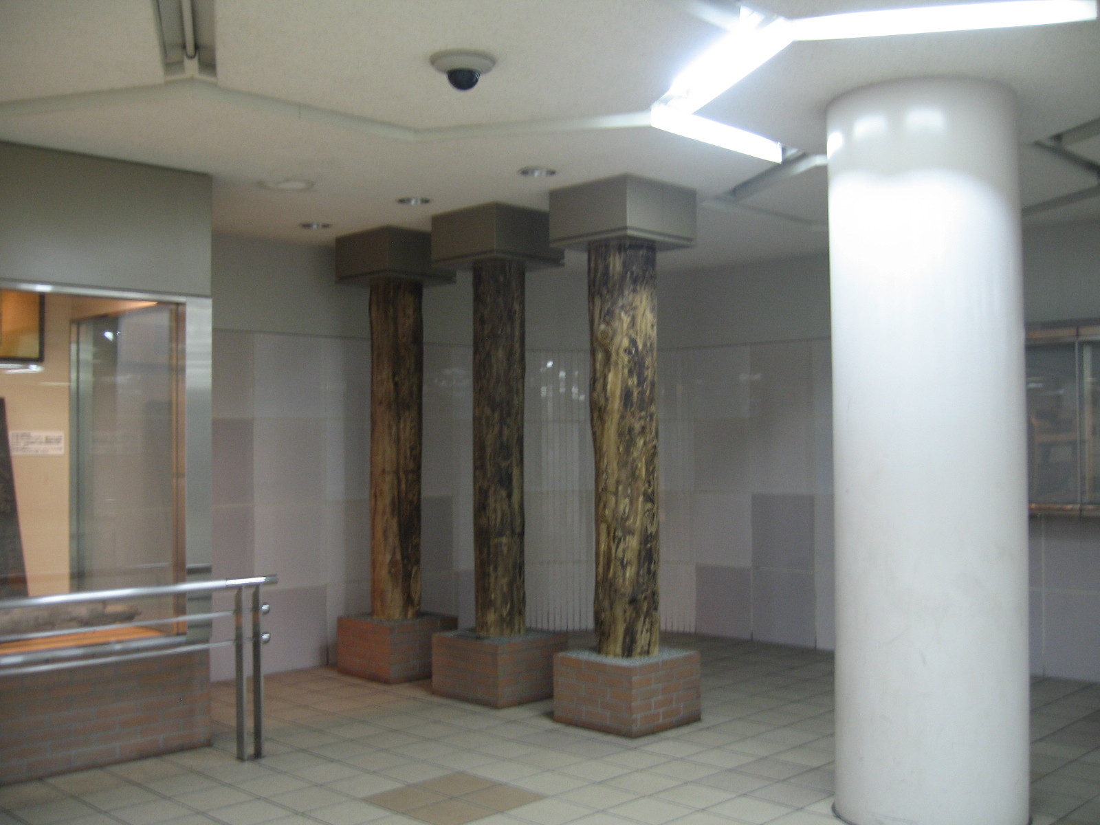 新潟市中央区。万代クロッシング内に展示されている二代目萬代橋の橋杭。